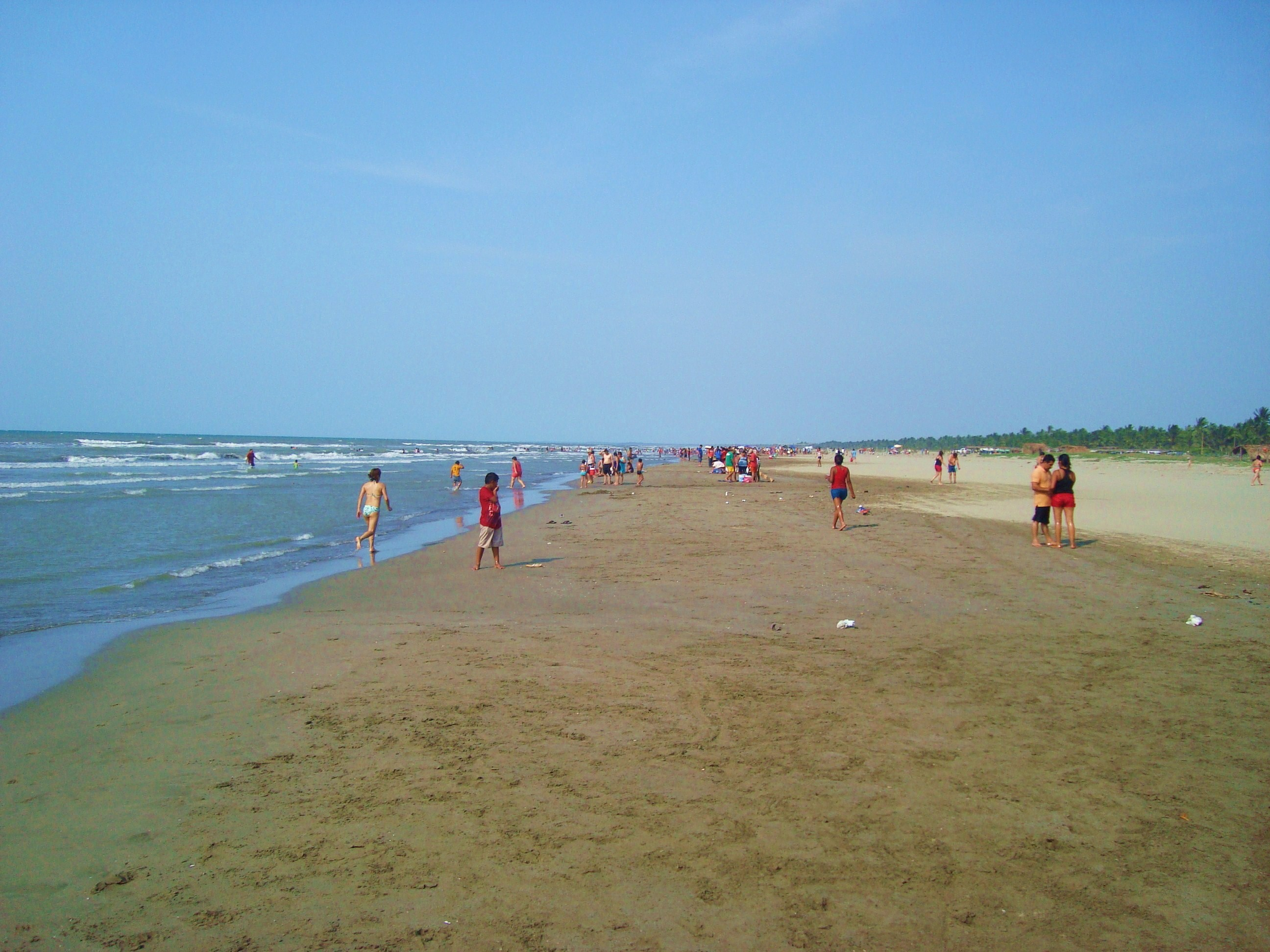 Panorama de la playa Miramar, municipio de Centla, estado de Tabasco, México.